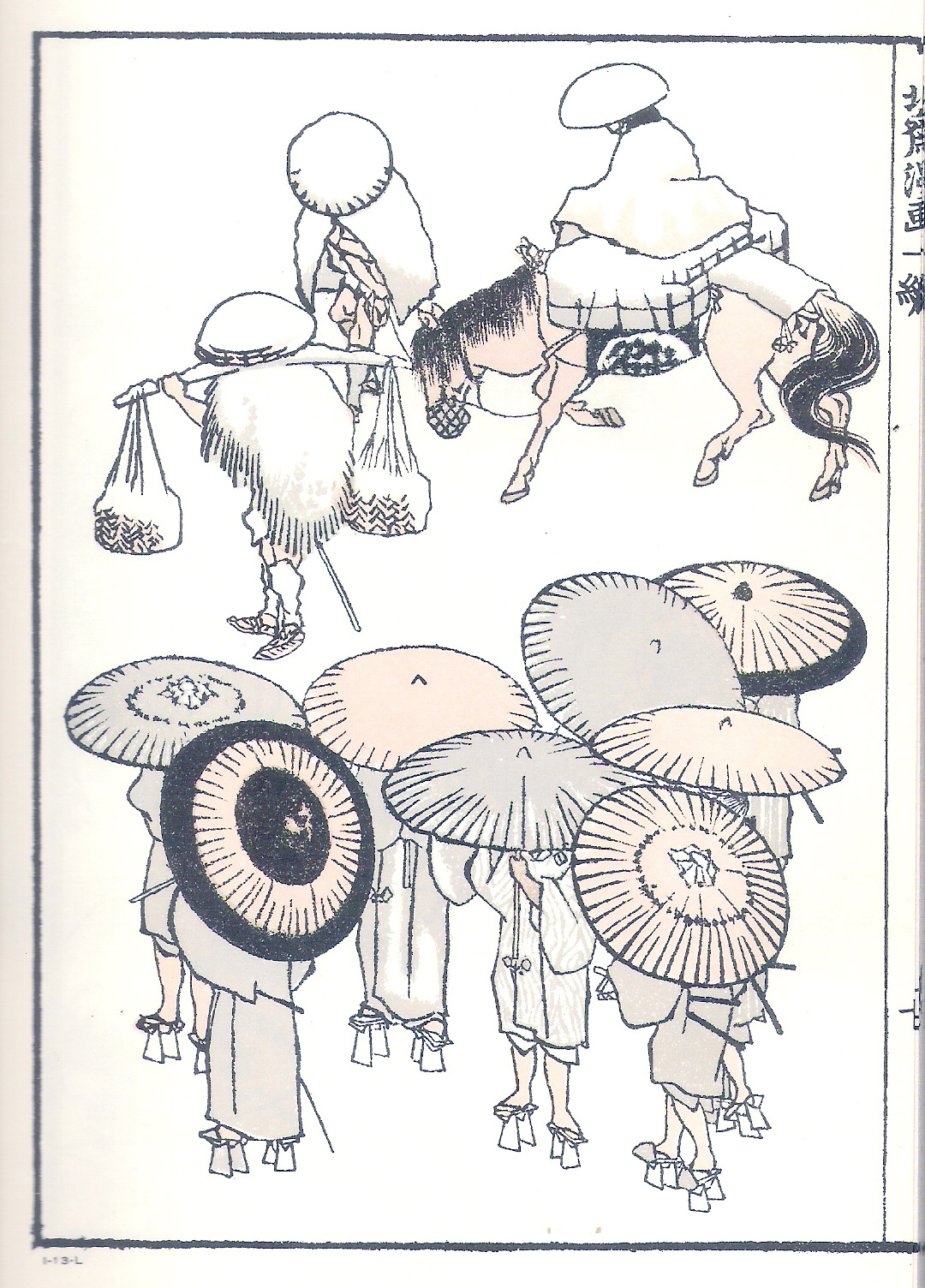 A page from Hokusai Manga Volume I